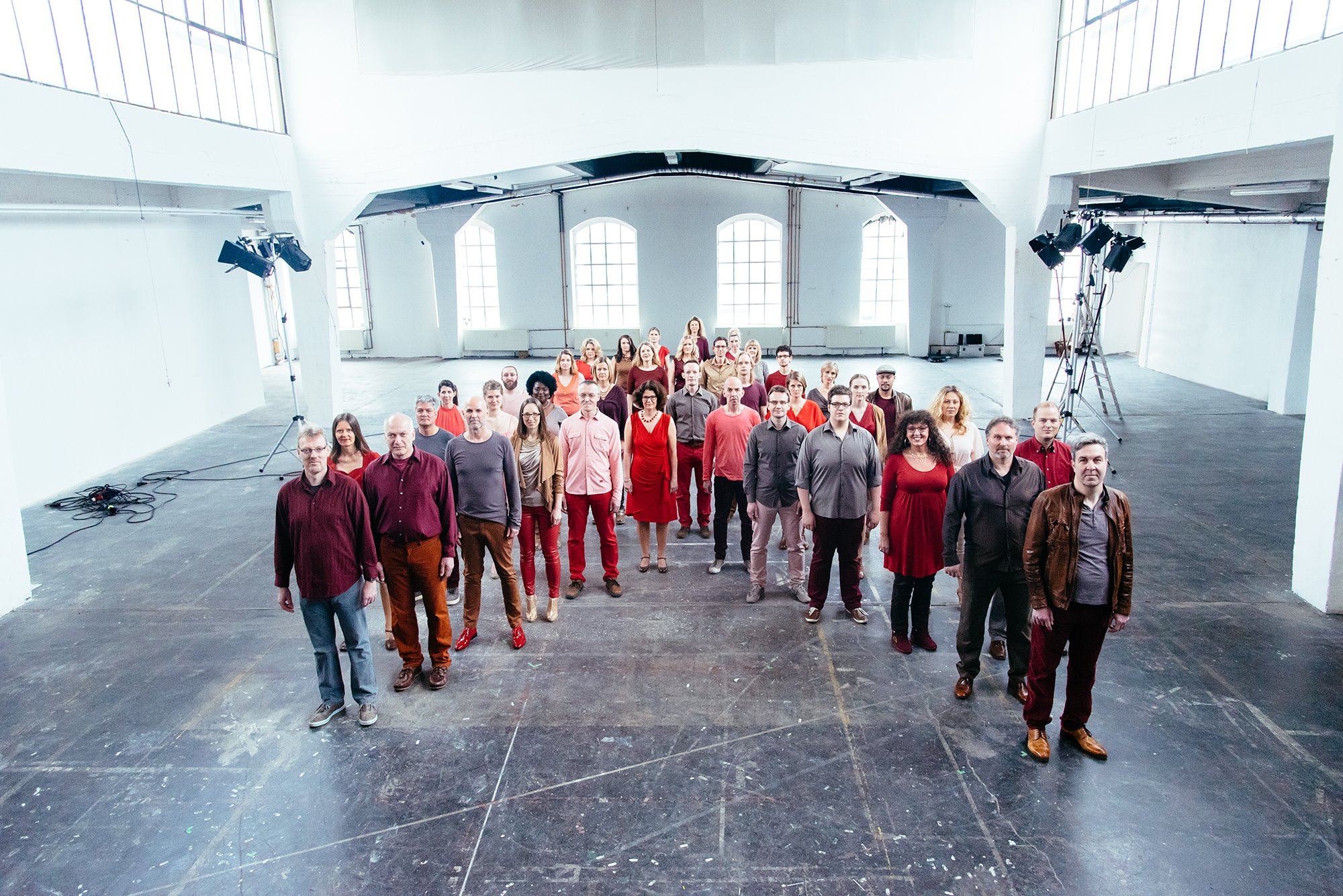 Fotoshooting 2016